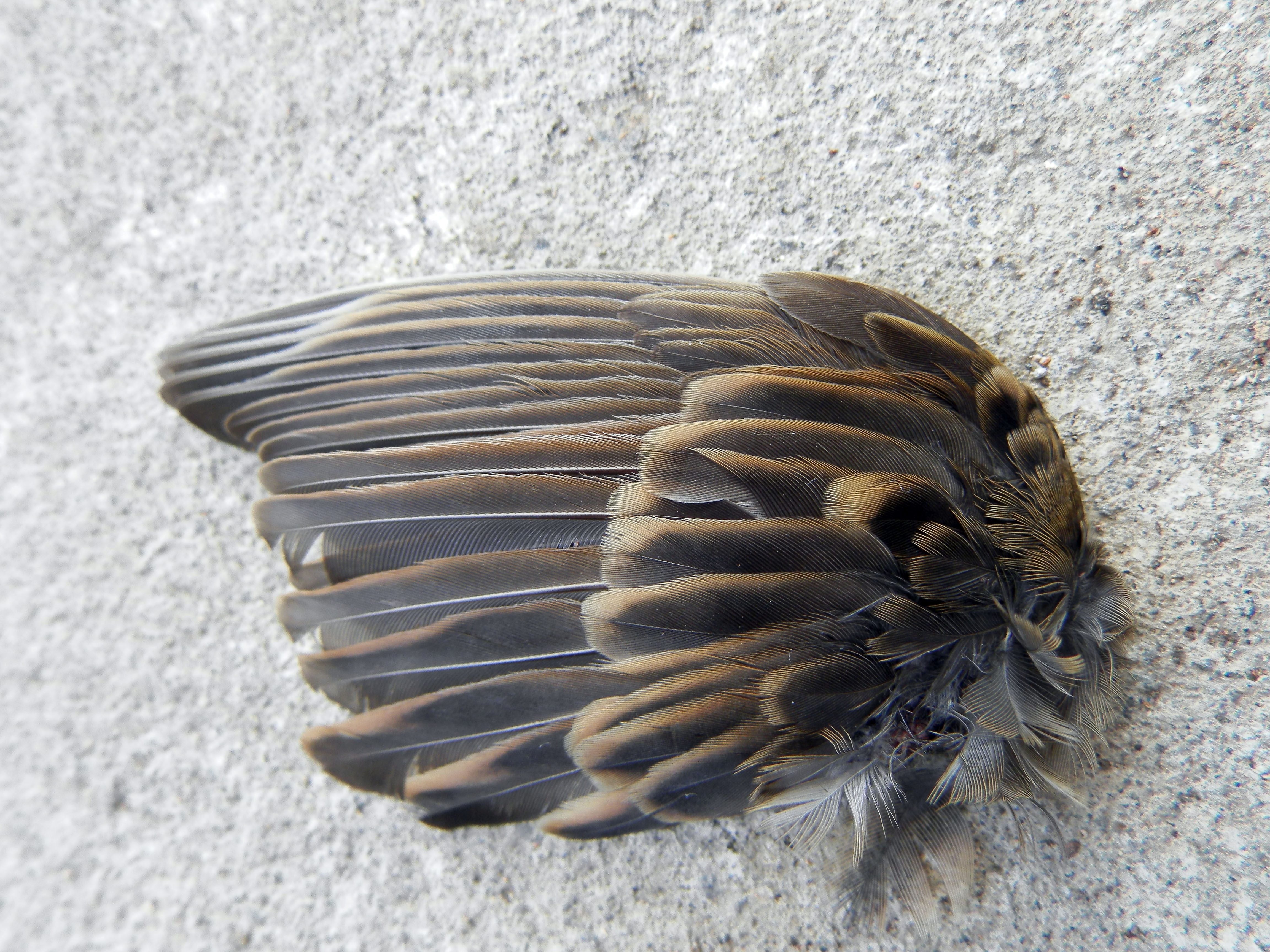 スズメの左翼。